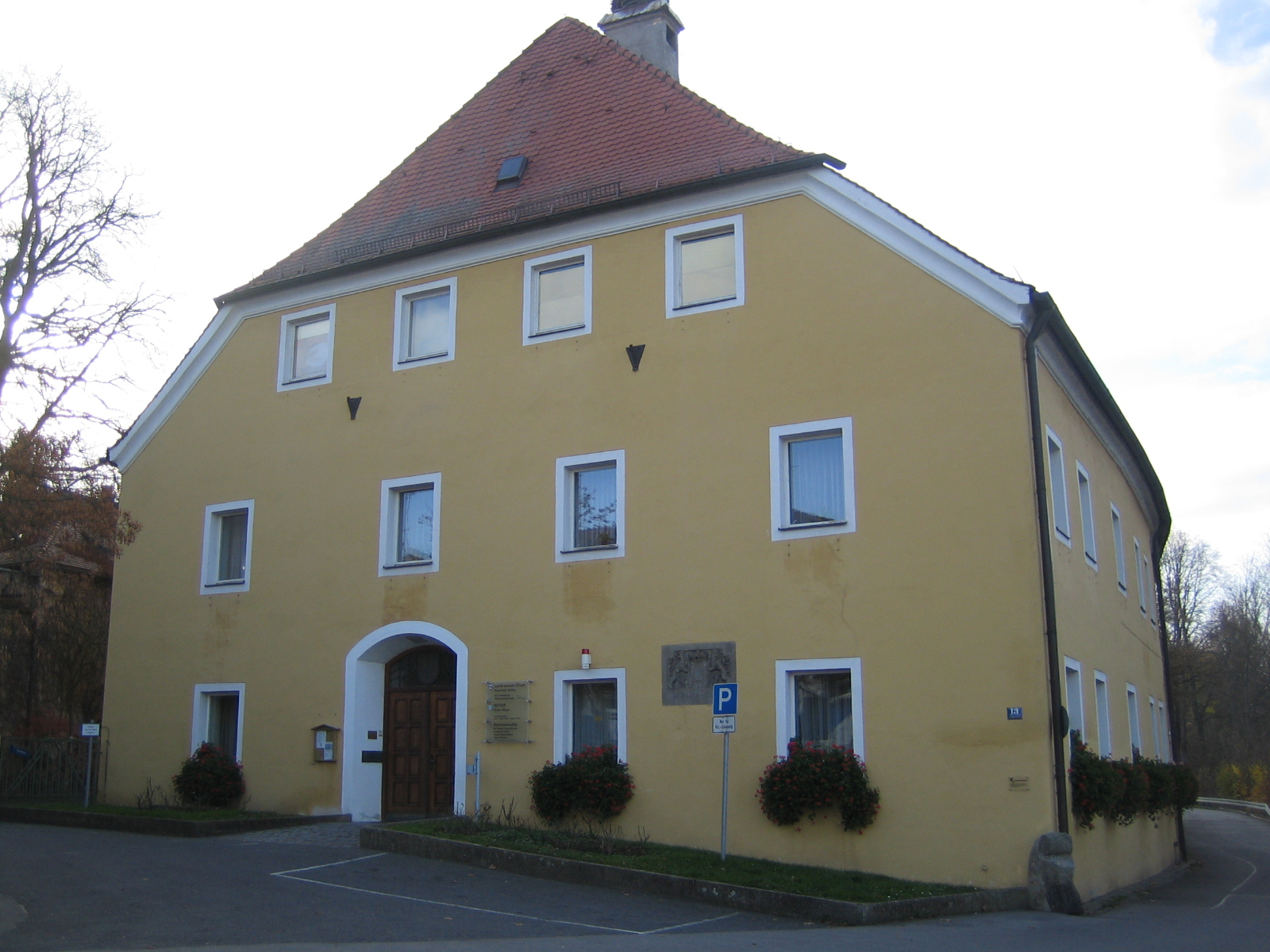 Inhalt: Landesgerichtsgebäude Roding Seit 1815 Sitz des Landgerichts Roding Erstellt von Denis Apel / Datum: 11.11.2008